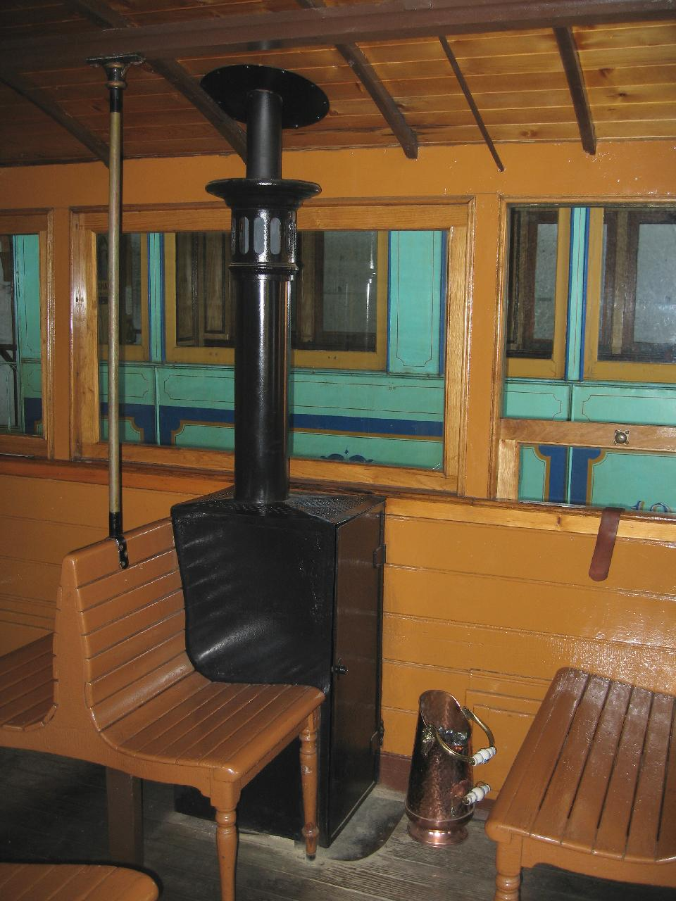 Innenansicht des 3. Klasse Abteils des historischer Personenwagen C4 171 mit Holzkohlenheizung der Süddeutsche Eisenbahn-Gesellschaft (SEG) bei der Museumsbahn Blonay–Chamby in Chamby-Musée (Chaulin) im Sommer 2011.